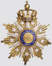 Imagem da Medalha dada pela Comenda de Nsa. Sra. de Vila Viçosa, Portugal.